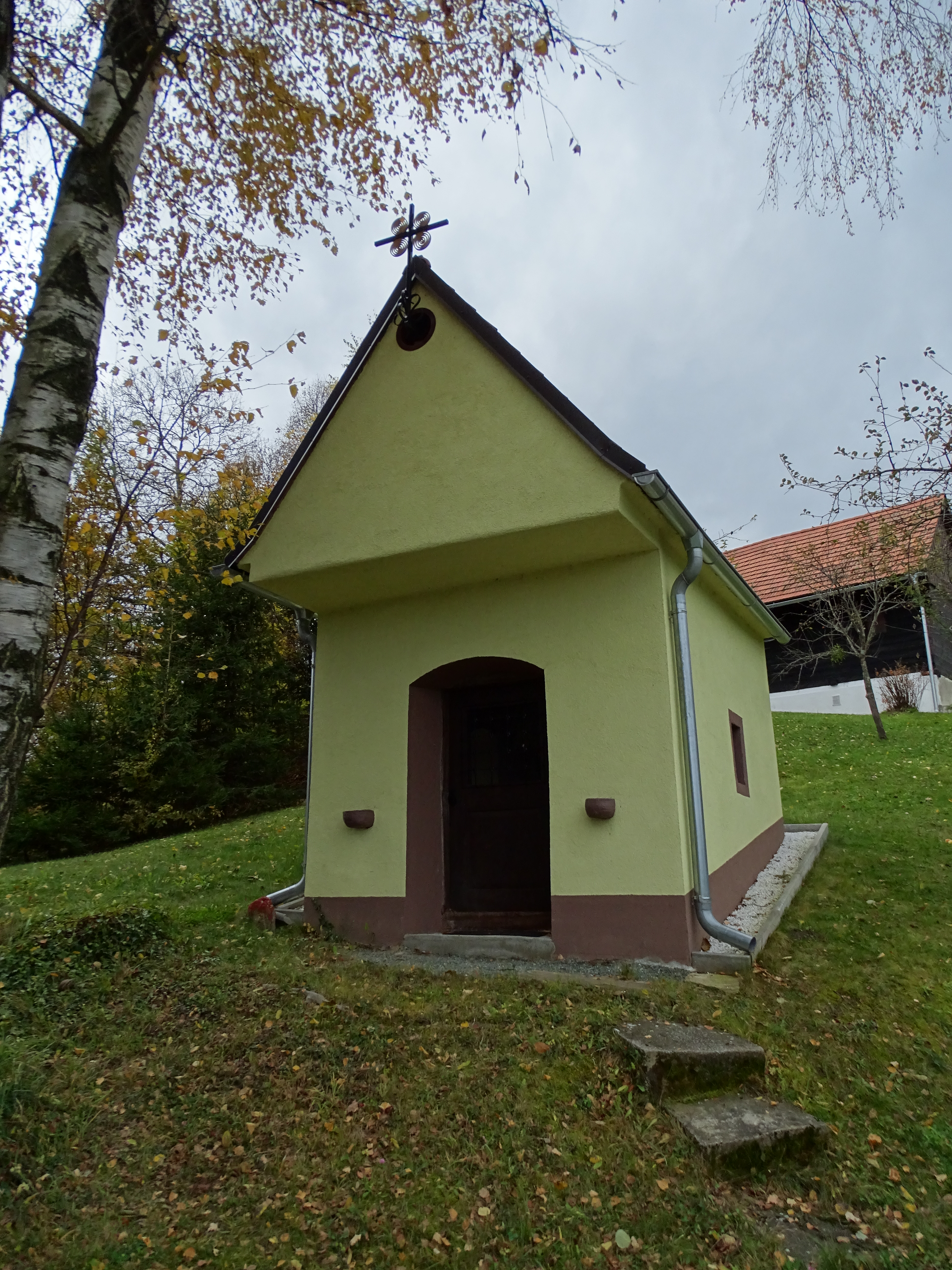 Die Tischlerweberkapelle beim Bauernhof Tischlerweber in Großwöllmiß in der Gemeinde Sankt Martin am Wöllmißberg